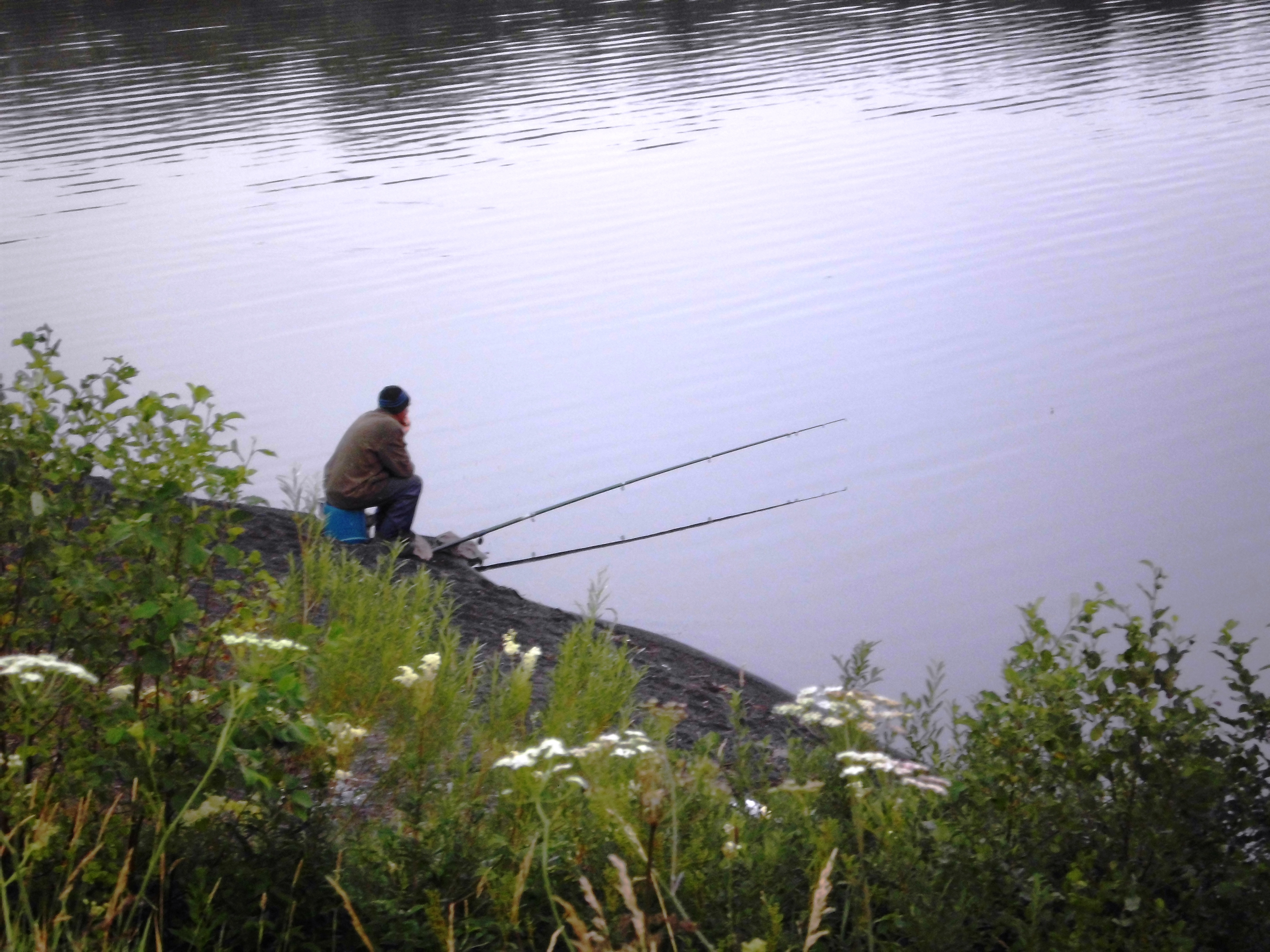 Верхнеуфалейский пруд в городе Верхний Уфалей на реке Уфалейка. Юго-восточный берег. Рыбак на утренней рыбалке.